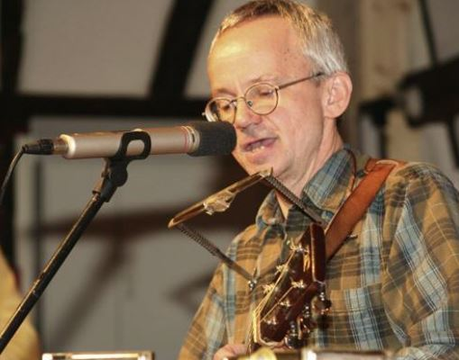 Aktuelles Bild vom Günther Wölfle